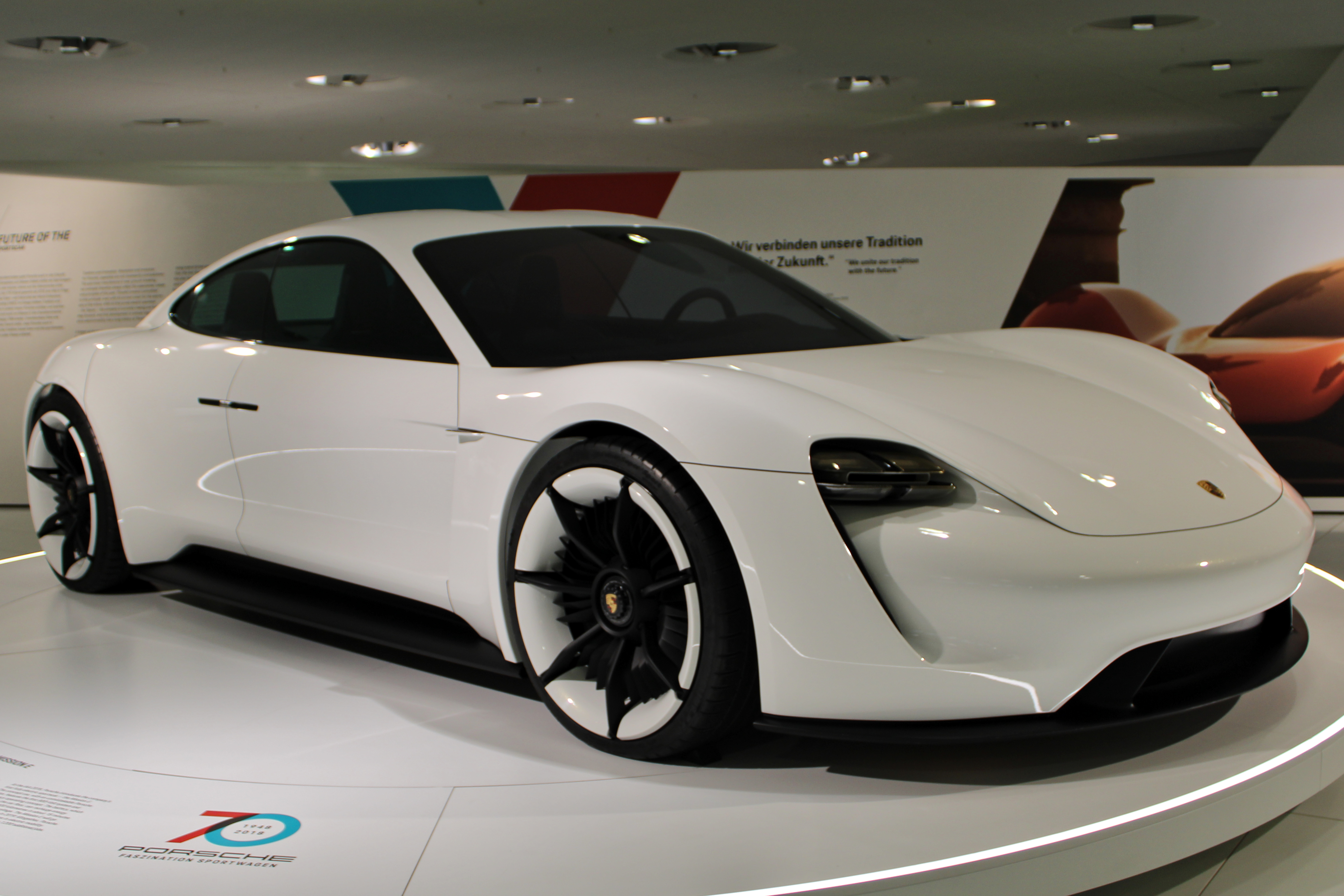 Porsche Mission E in the Porsche Museum 2018